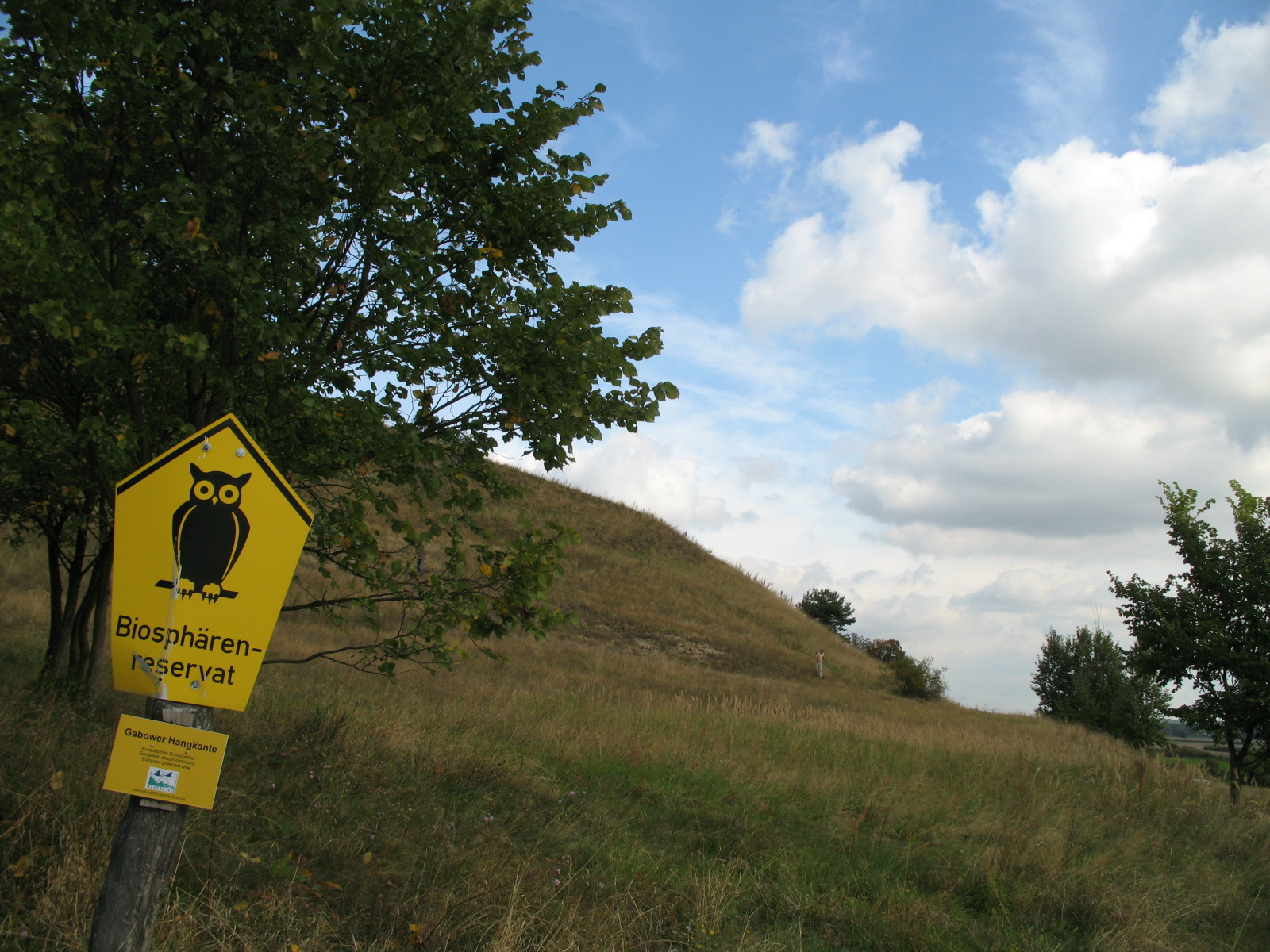 FFH-Gebiet DE-3150-303 „Gabower Hangkante“ am Südostrand der Neuenhagener Oderinsel in Bad Freienwalde, Landkreis Märkisch-Oderland, Brandenburg – Links im Bild zwei Hinweisschilder, unten (mit Natura-2000-Logo) zum FFH-Gebiet und oben (mit Eulensymbol) zum großräumigen Biosphärenreservat Schorfheide-Chorin, in dem das FFH-Gebiet liegt. Hinweis: Kurt Kretschmann, der ursprüngliche Gestalter der „Naturschutz-Eule“ der DDR-Schutzgebietsschilder, lebte mehrere Jahrzehnte in Bad Freienwalde.